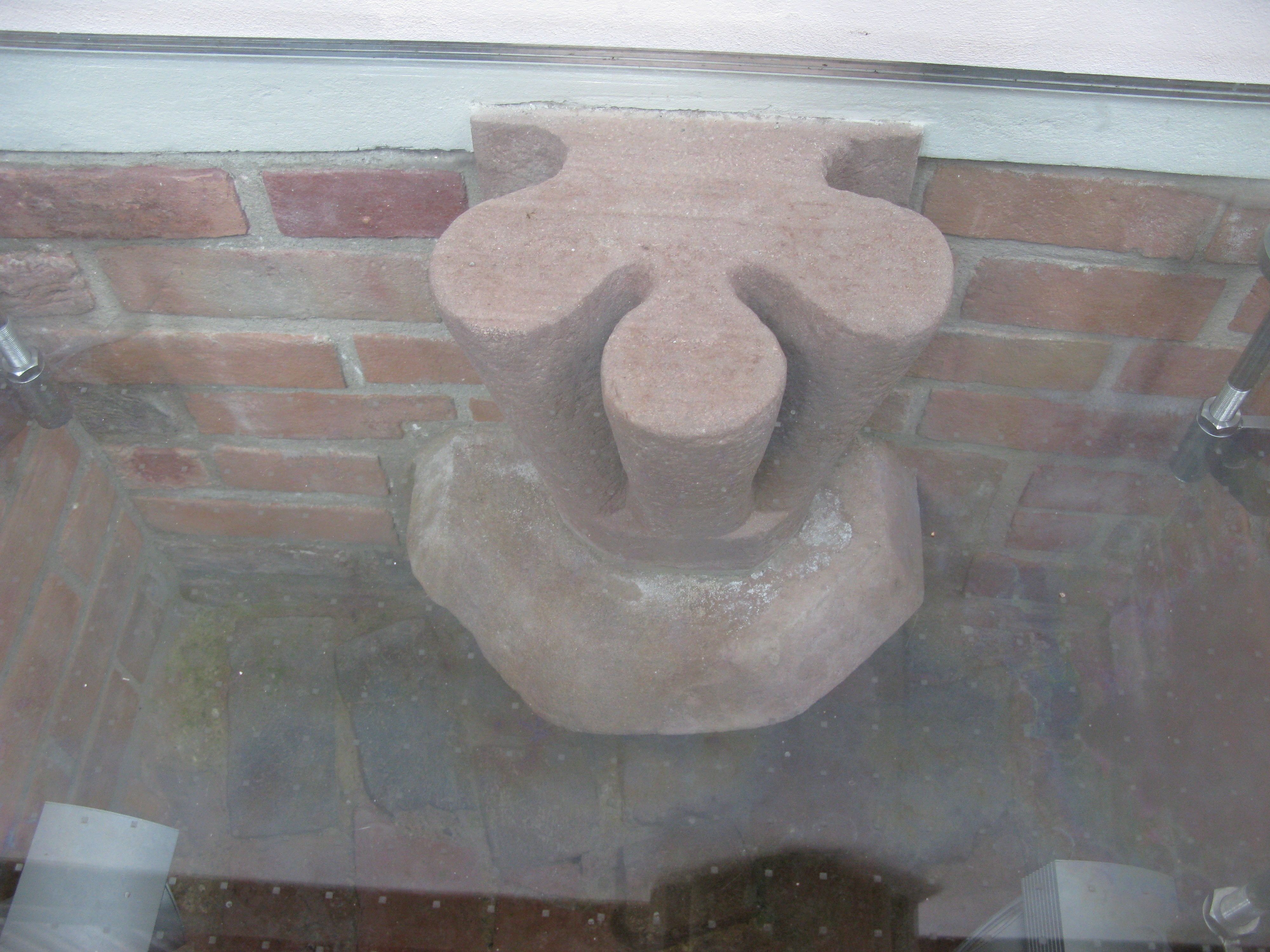 konzola